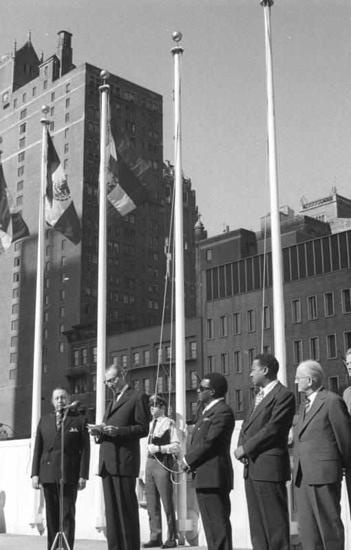 ADN-ZB/Spremberg, 25.9.1973, New York: DDR in die UNO aufgenommen Die erste Woche der XXVIII. Tagung der UNO-Vollversammlung in NEW YORK stand ganz im Zeichen der Aufnahme der Deutschen Demokratischen Republik und anderer neuer Mitglieder in die Weltorganisation. Am 18. September 1973, dem Tage der Eröffnung der Vollversammlung, nahm die DDR auf einstimmigen Beschluß des Weltforums ihren legetimen Platz in den Vereinten Nationen ein. UBz: Am Morgen des 19. September 1973 wurde von Mitgliedern der UNO-Fahnenwache in Anwesenheit UNO-Generalsekretäre Kurt Waldhein der Mitglieder der DDR-Regierungsdelegation sowie zahlreicher anderer Staatenvertreter die Staatsflaage der DDR gehißt. Unser Bild zeigt UNO-Generalsekretär Kurt Waldheim (2.v.l.) bei seiner Ansprache vor dem Hissen der Flagge. Rechts der Minister für Auswärtige Angelegenheiten der DDR, Otto Winzer, Leiter der Regierungsdelegation der Deutschen Demokratischen Republik. Links der Präsident der XXVIII.-UNO-Vollversammlung Leopold Benites. Neben Außenminister Winzer die Vertreter der gleichfalls in die UNO aufgenommenen Bahamas.